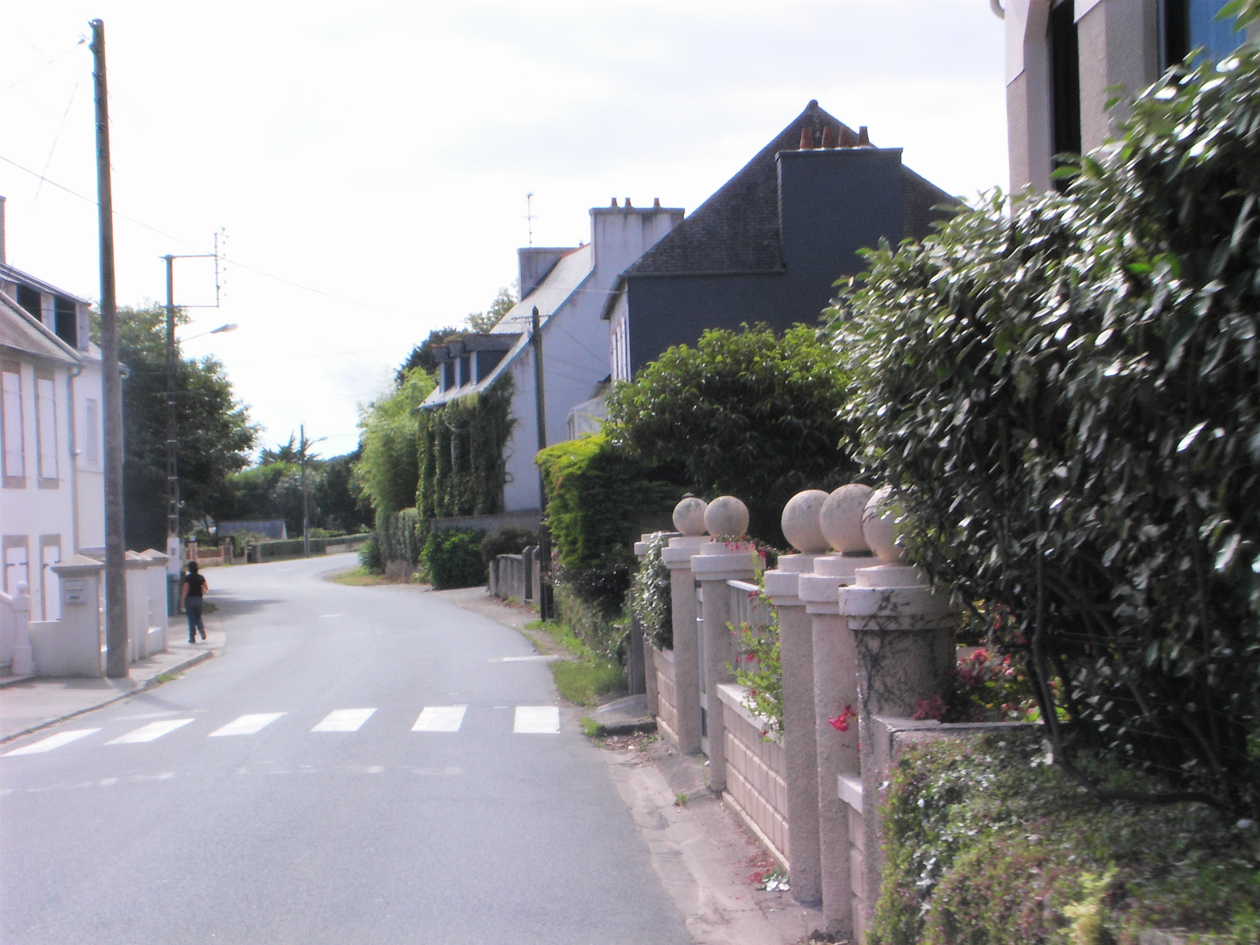 Telgruc-sur-Mer le 17 août 2007, France.